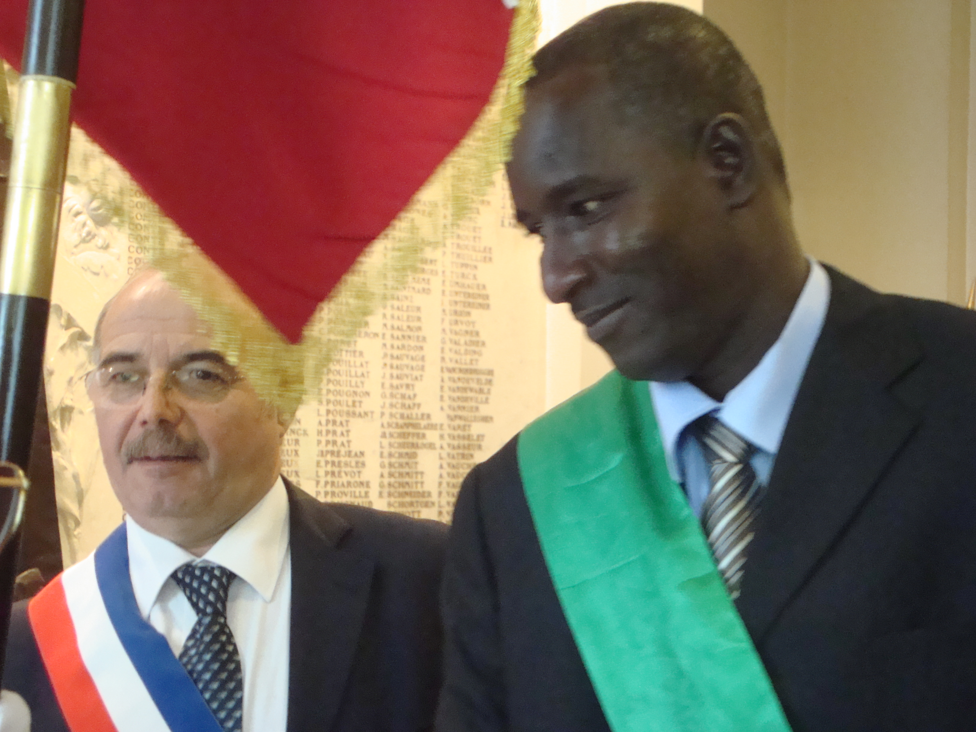 Jacques Salvator, maire d'Aubervilliers, avec Mr Boudé Yadera, maire de Boully, lors des cérémonies du 11 novembre 2009 à la Mairie de d'Aubervilliers.